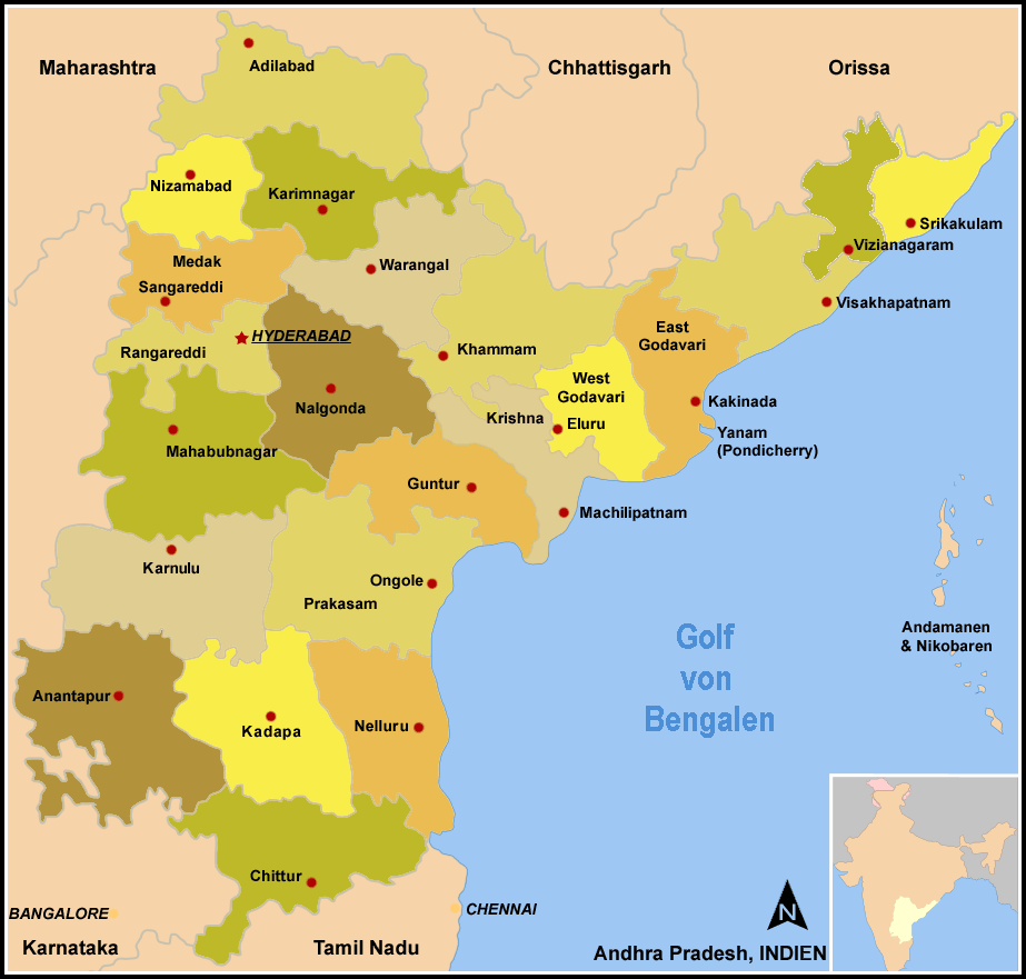 Distrikte und Distrikthauptstädte von Andhra Pradesh (Indien) selbst erstellt auf der Grundlage von Image:Map AP dist all shaded.png